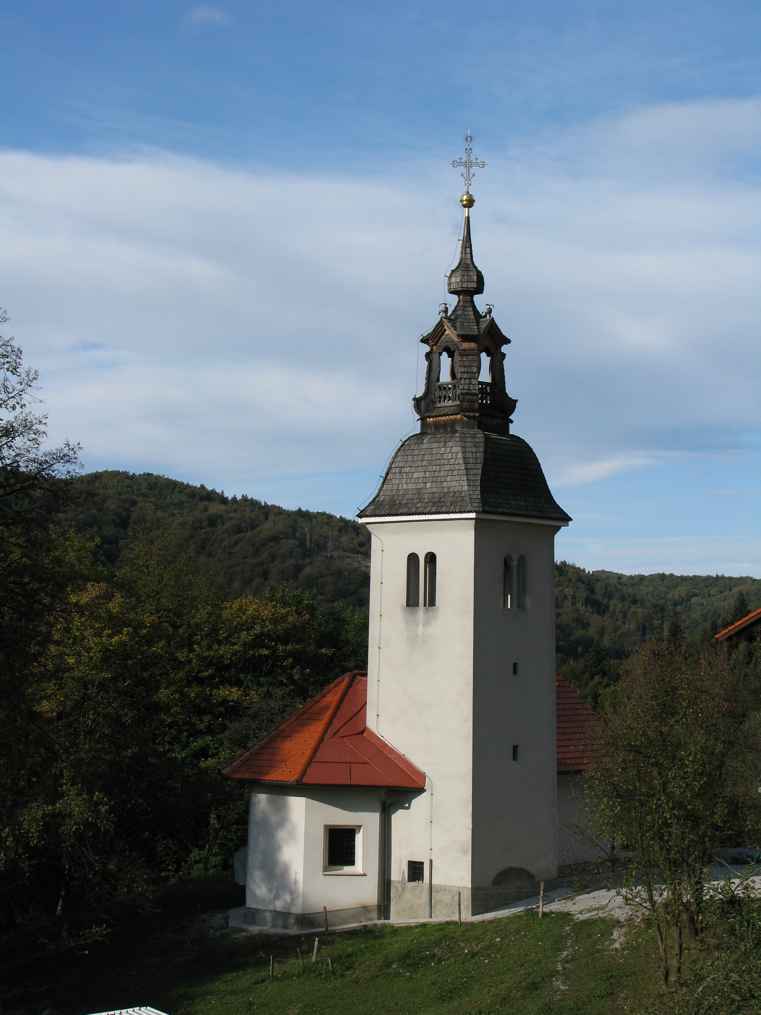 Podružnična cerkev Sv. Jakoba starejšega, Borje pri Mlinšah